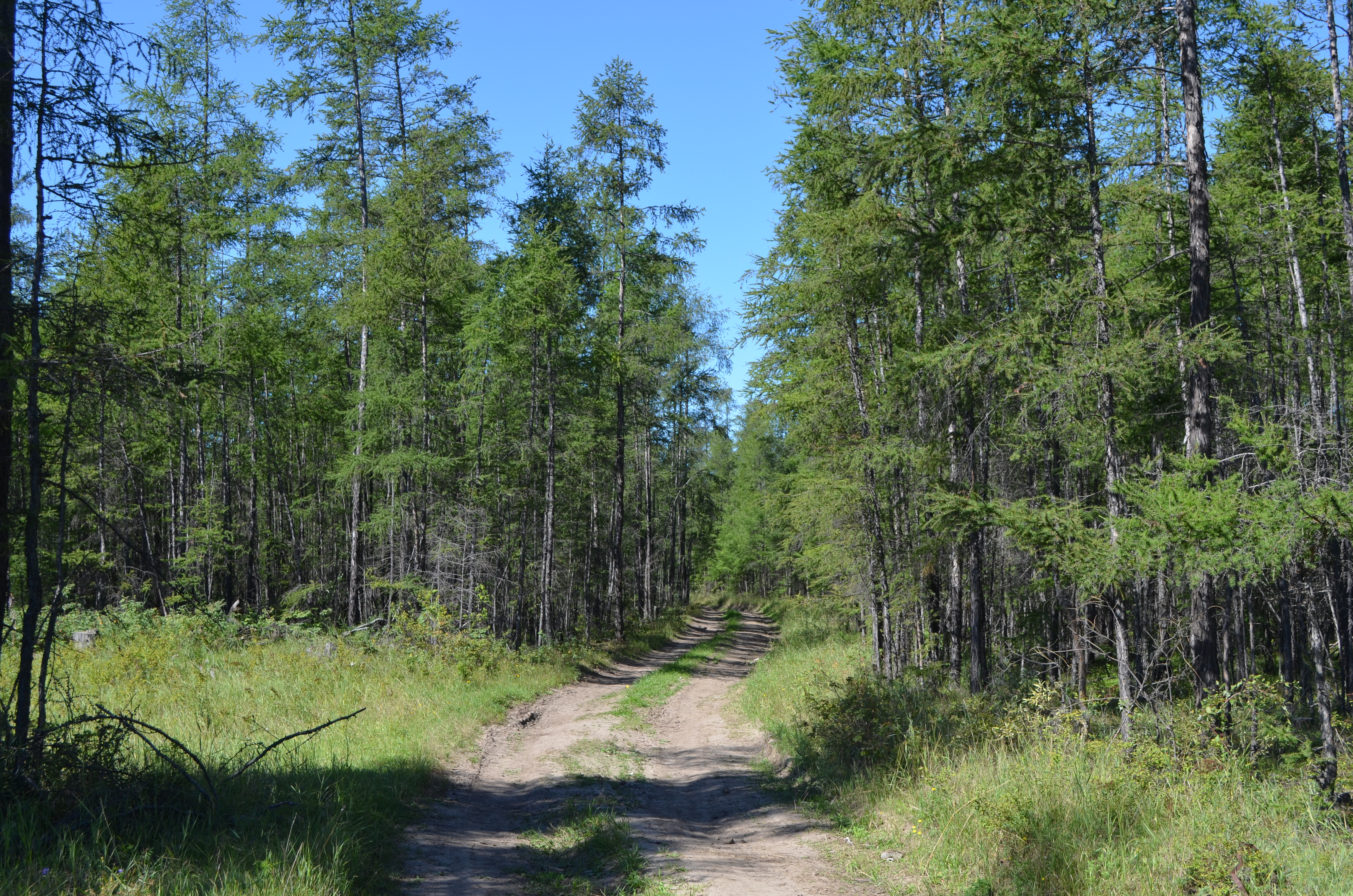 с. Майя Мегино-Кангаласского района Якутии и его окрестности, август 2016 г.